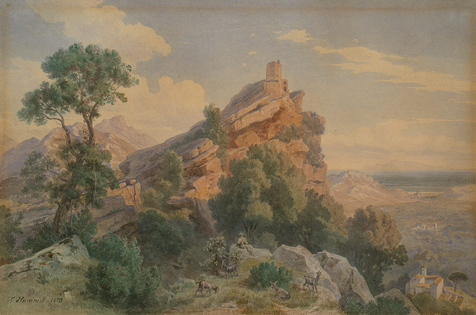 Der Turm des Seneca auf Korsika mit Blick auf das Tal von Luri im Norden von Cap Corse, mit der Insel Elba am Horizont. Aquarell auf Velin. 33,5 x 50 cm.